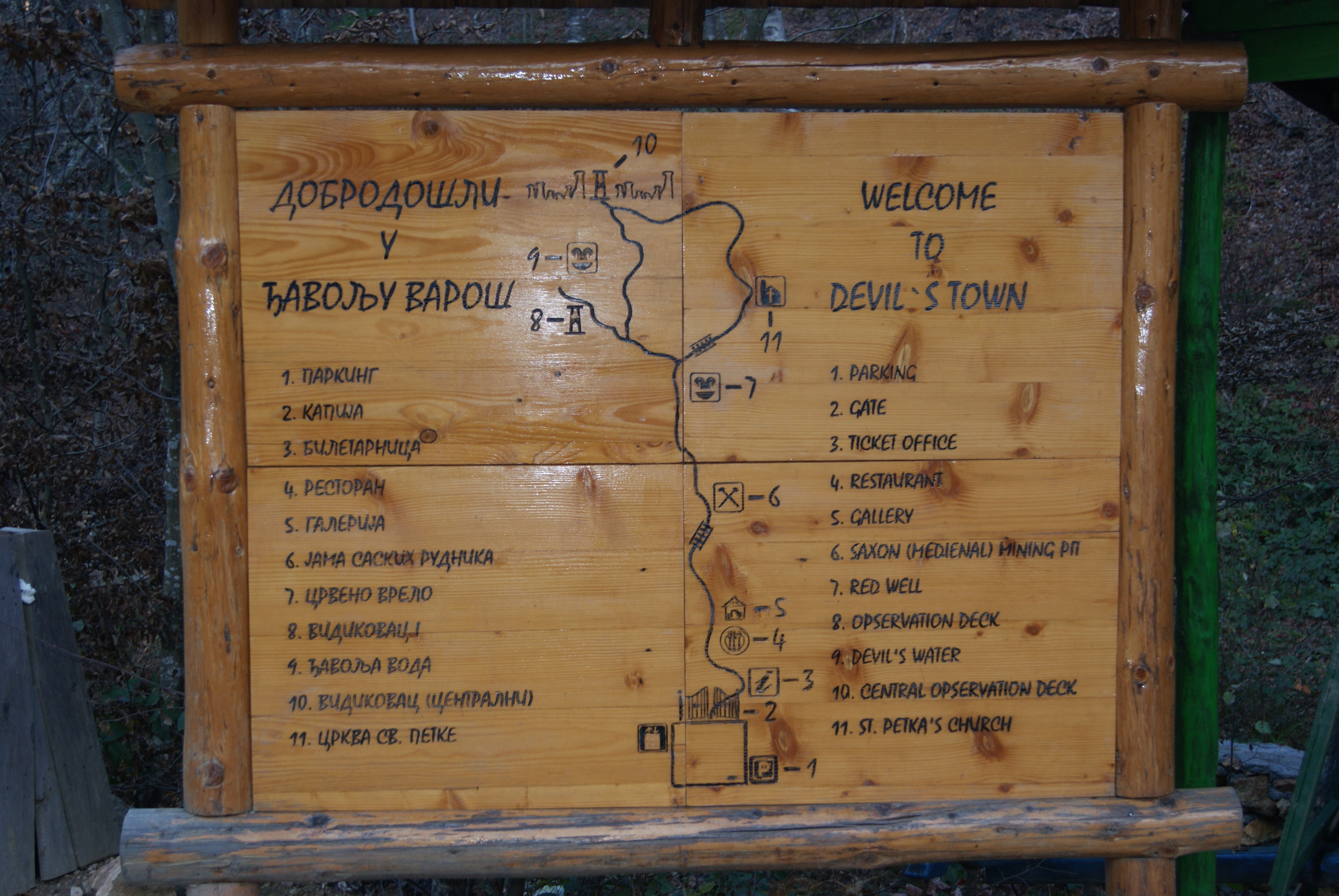 Mapa turističkog kompleksa Djavolja varos. Snimljeno u novembru 2010. Licensing